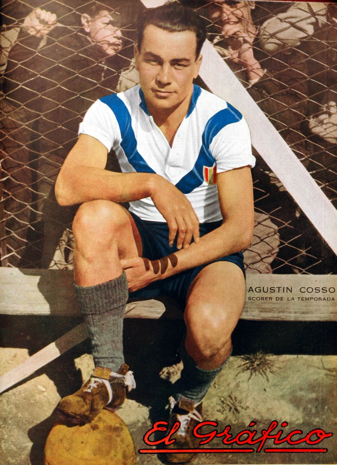 El Grafico del 02 de Noviembre de 1935. Edicion 851